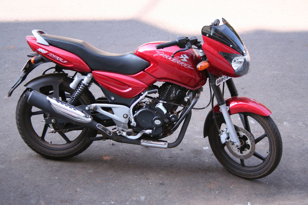 Red Bajaj Pulsar outside our hotel